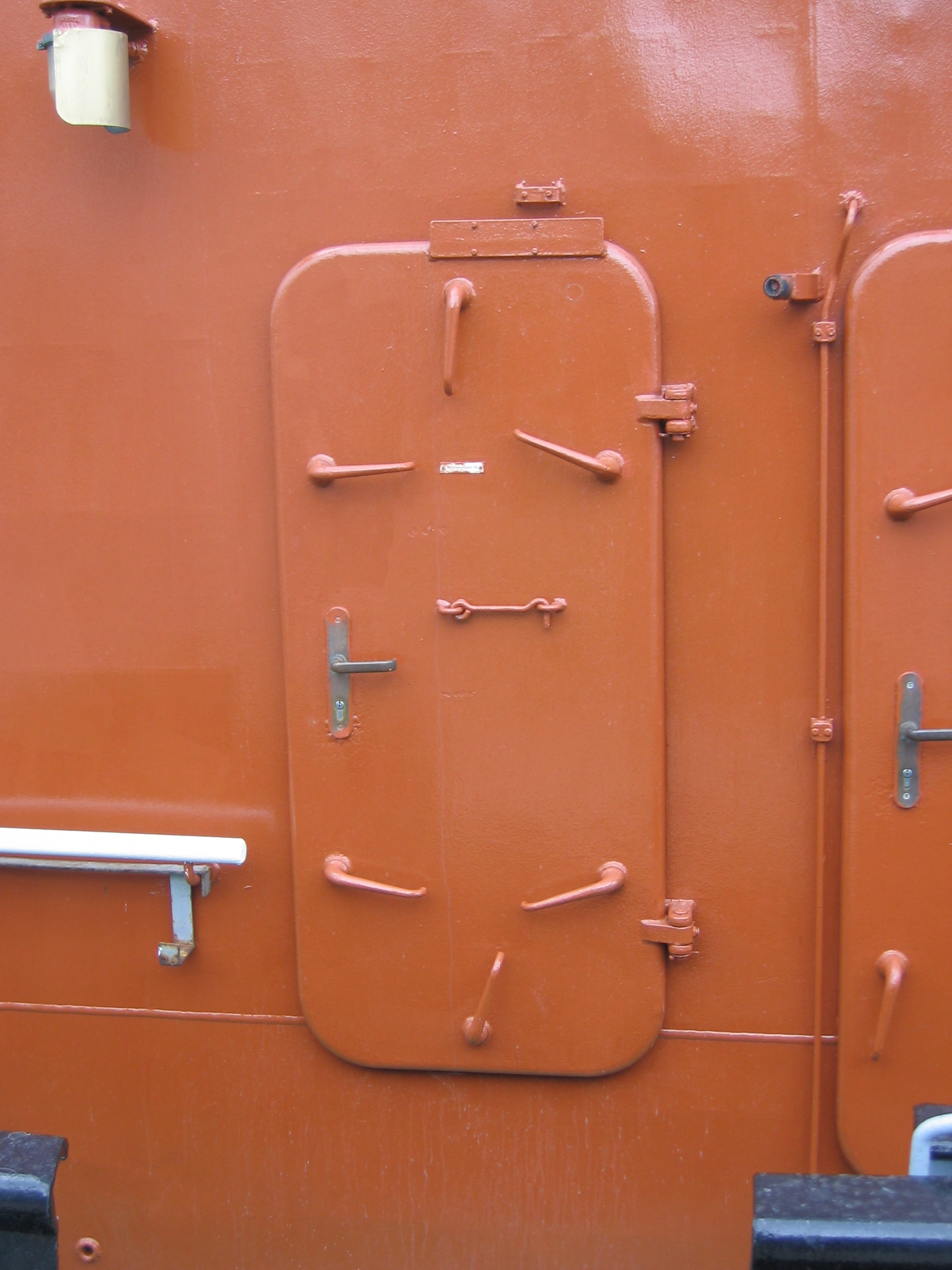 Door (ship) Drzwi strugoszczelne